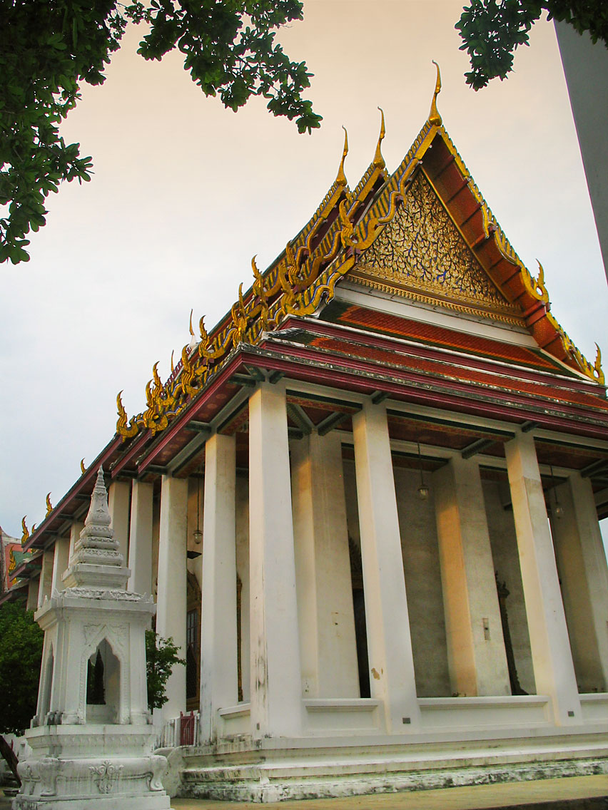 Evening sun on ubosot of Wat Rajanadda, Bangkok, Thailand.